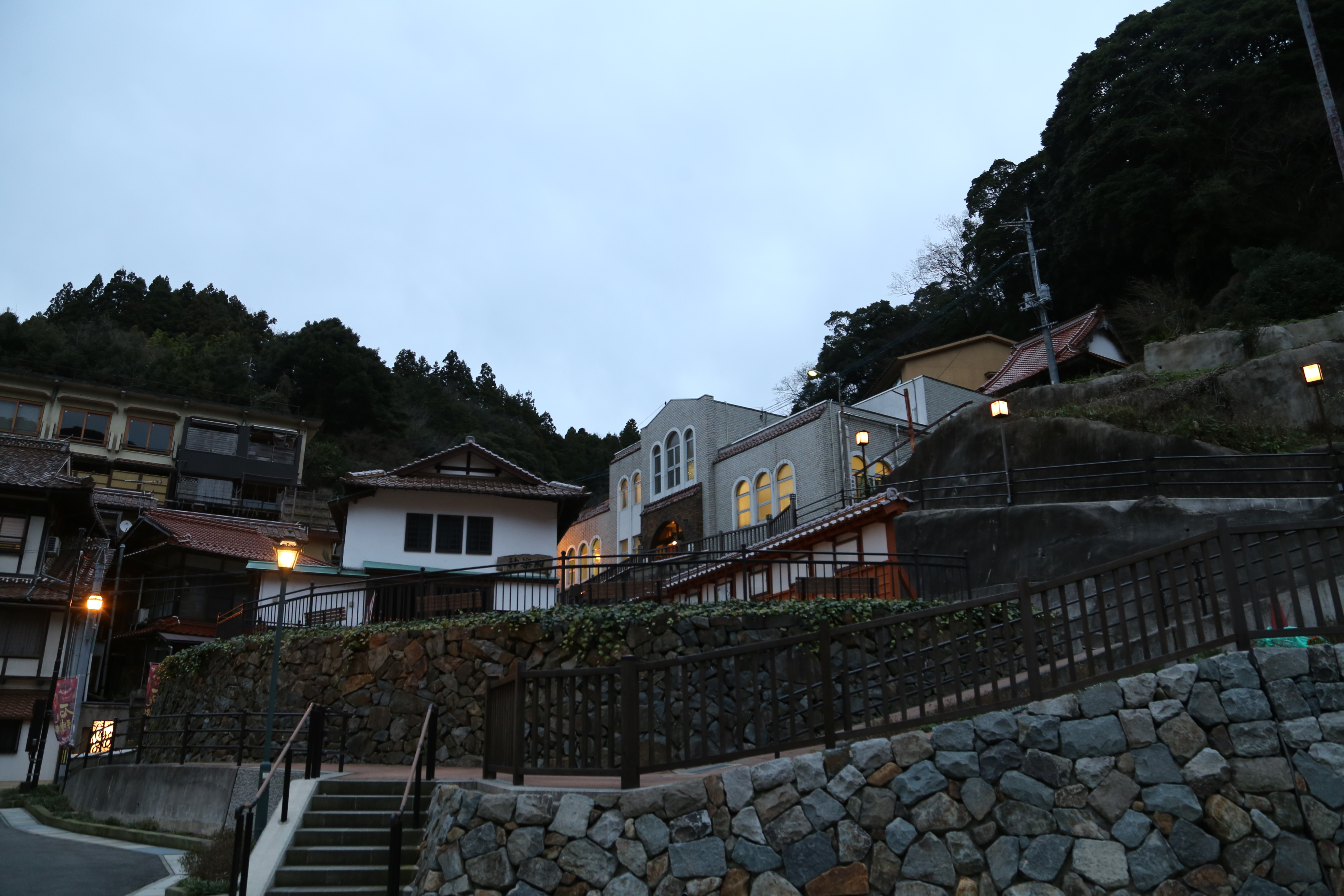 有福温泉の御前湯